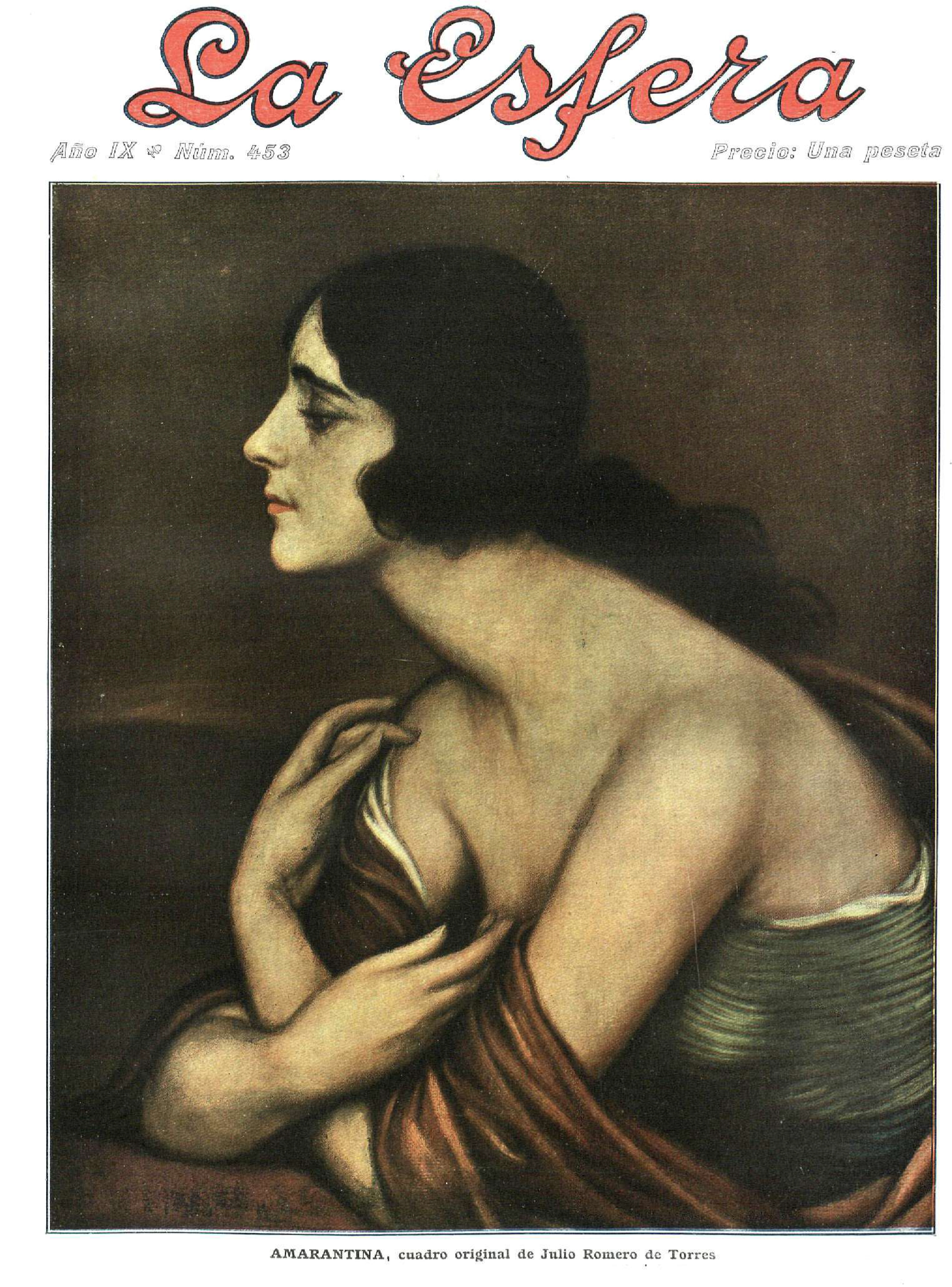 Amarantina.